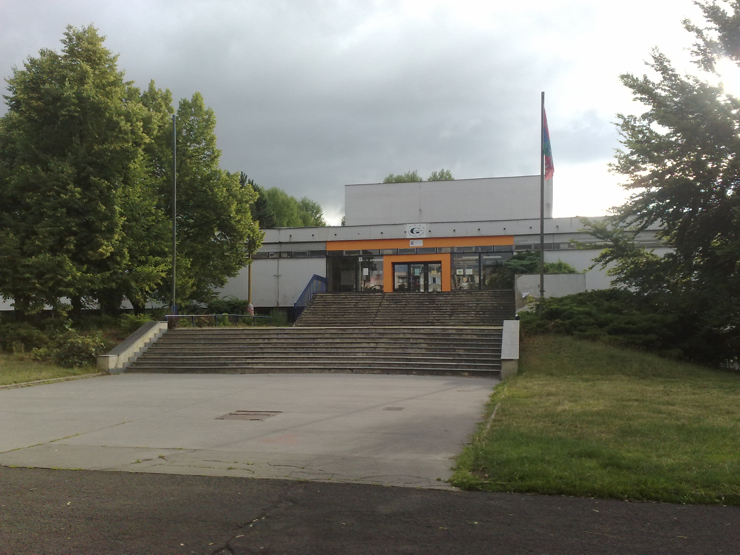 Ústecké gymnázium Václava Šmejkala v Jateční ulici.